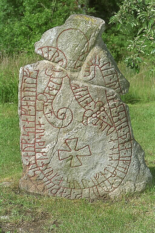 Runsten Sö196